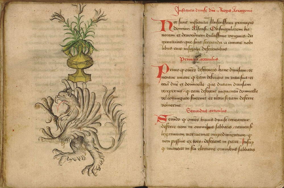 Abzeichen des aragonesischen Kannenordens, Erfgoedbibliotheek Hendrik Conscience, Antwerpen, [Wapenboek], Cod. B 89420, Bl. 18v